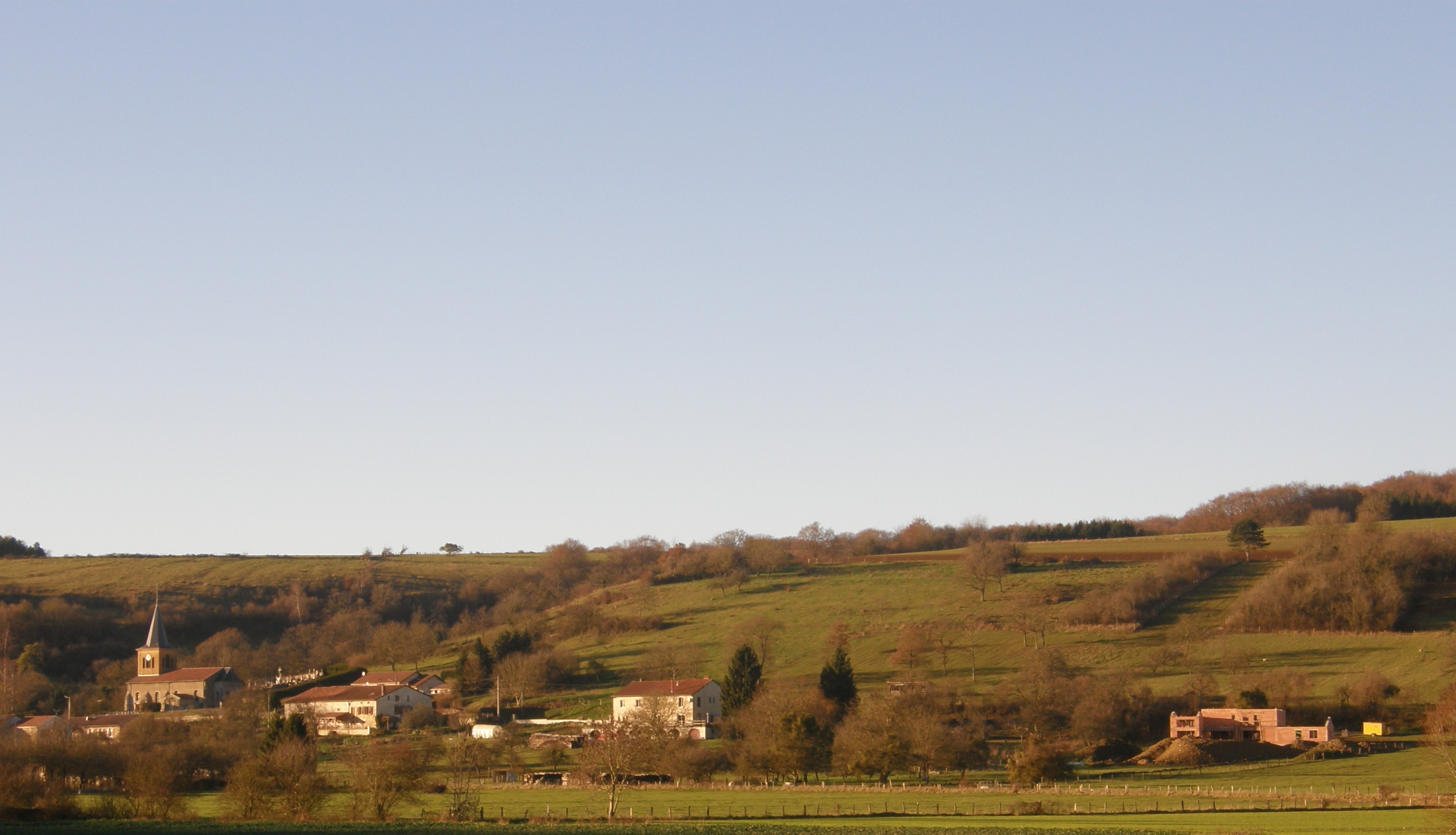 Réville-aux-Bois (Meuse). Mitage du territoire, encouragé par la réglementation française de l'urbanisme et les tribunaux administratifs (TA Nancy, j. réf., 9 décembre 2013, n° 1302728).